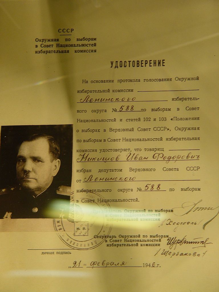 Удостоверение депутата Верховного Совета СССР, выданное И. Ф. Никишову 21.02.1946 г. Из экспозиции Магаданского областного краеведческого музея.